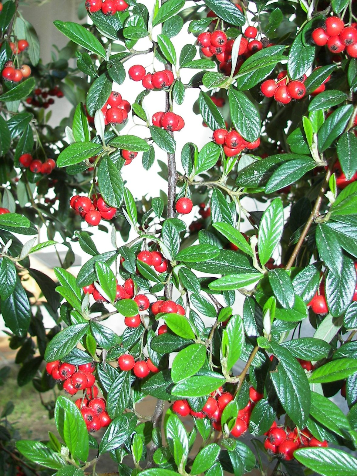 Archivo para incorporar a la pagina pues le falta la imagen